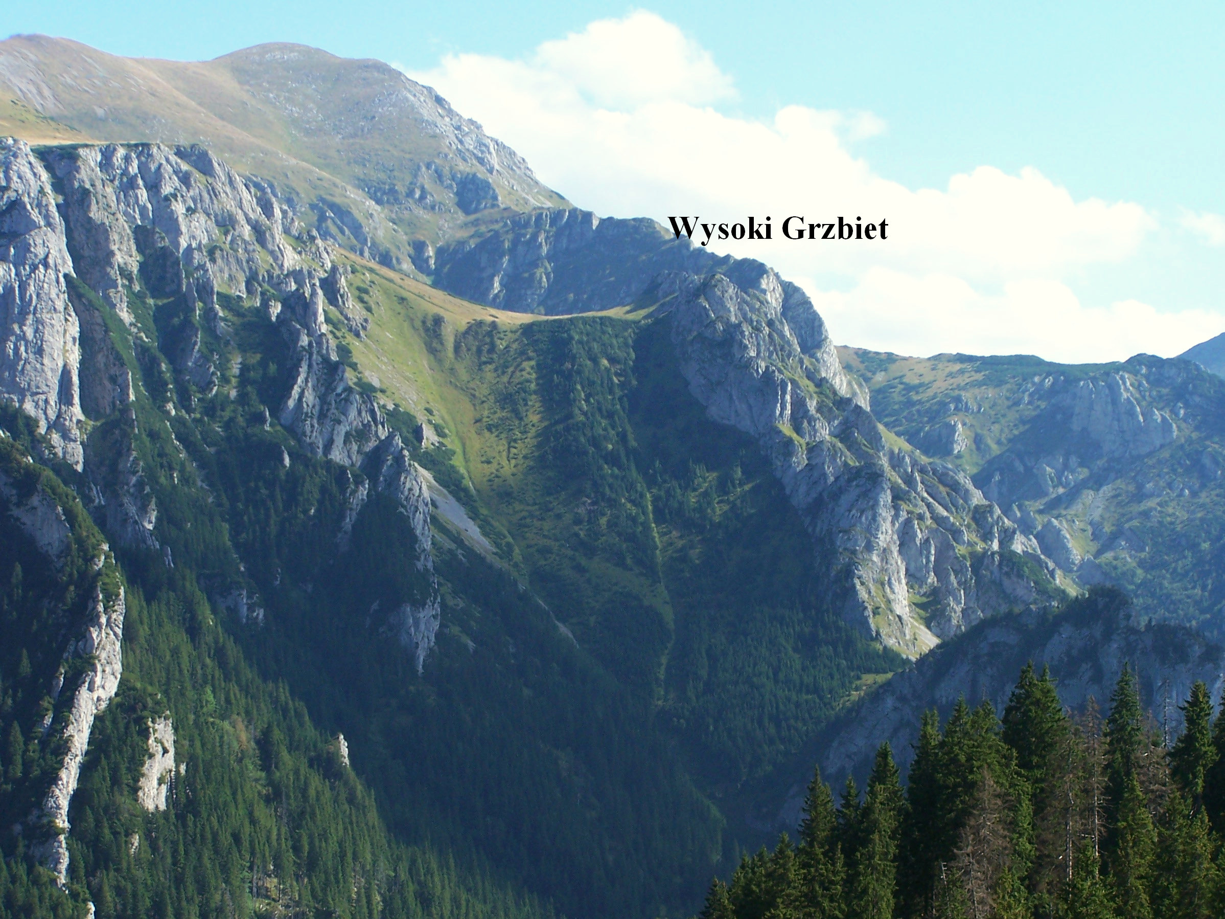 Ciemniak, Pisaniarskie Zdziary, Upłazkowa Przełaczka, Upłazkowa Turnia, Wysoki Grzbiet, Smreczyński Żar